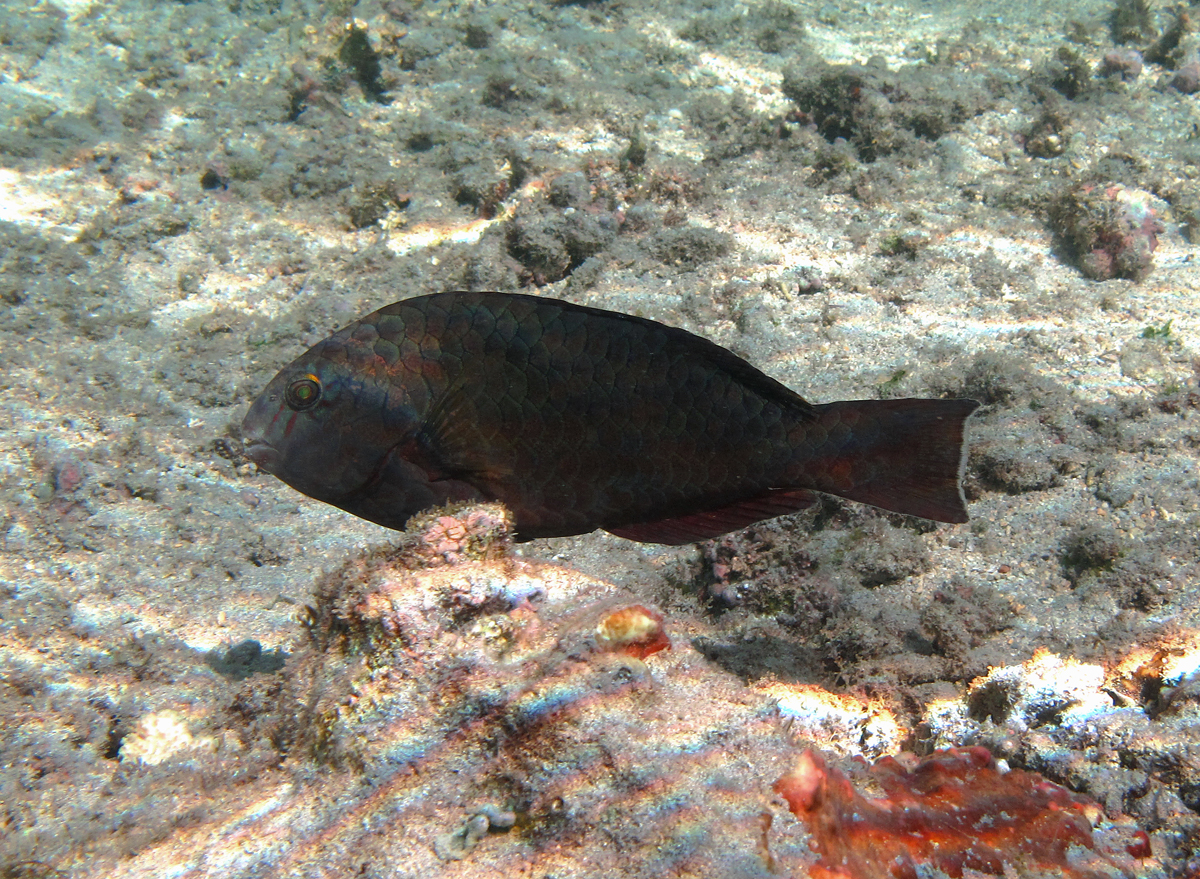 Un poisson-perroquet des carolines (Calotomus carolinus) en phase initiale à la Réunion.